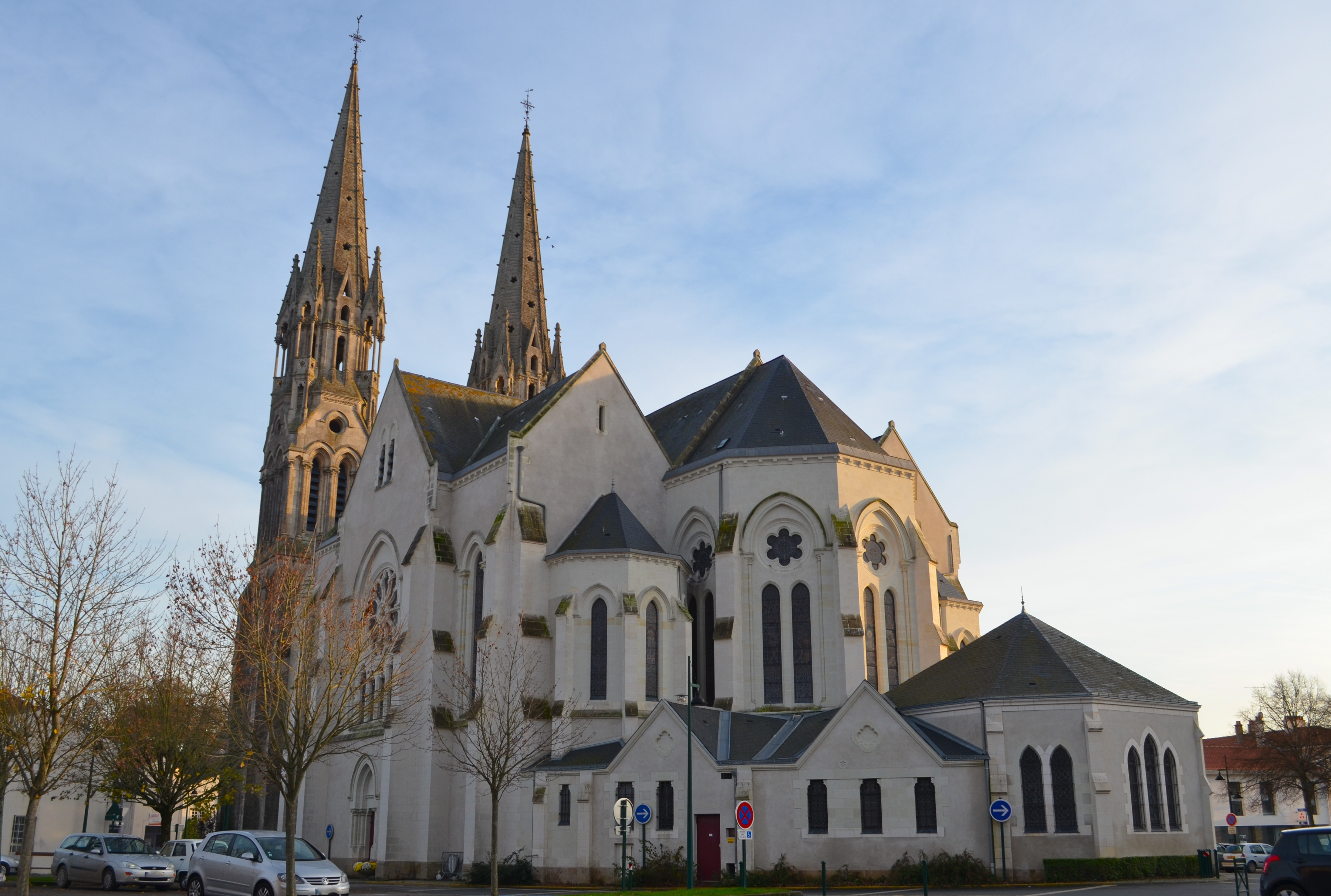 Eglise Saint Honoré - Machecoul (Loire-Atlantique)